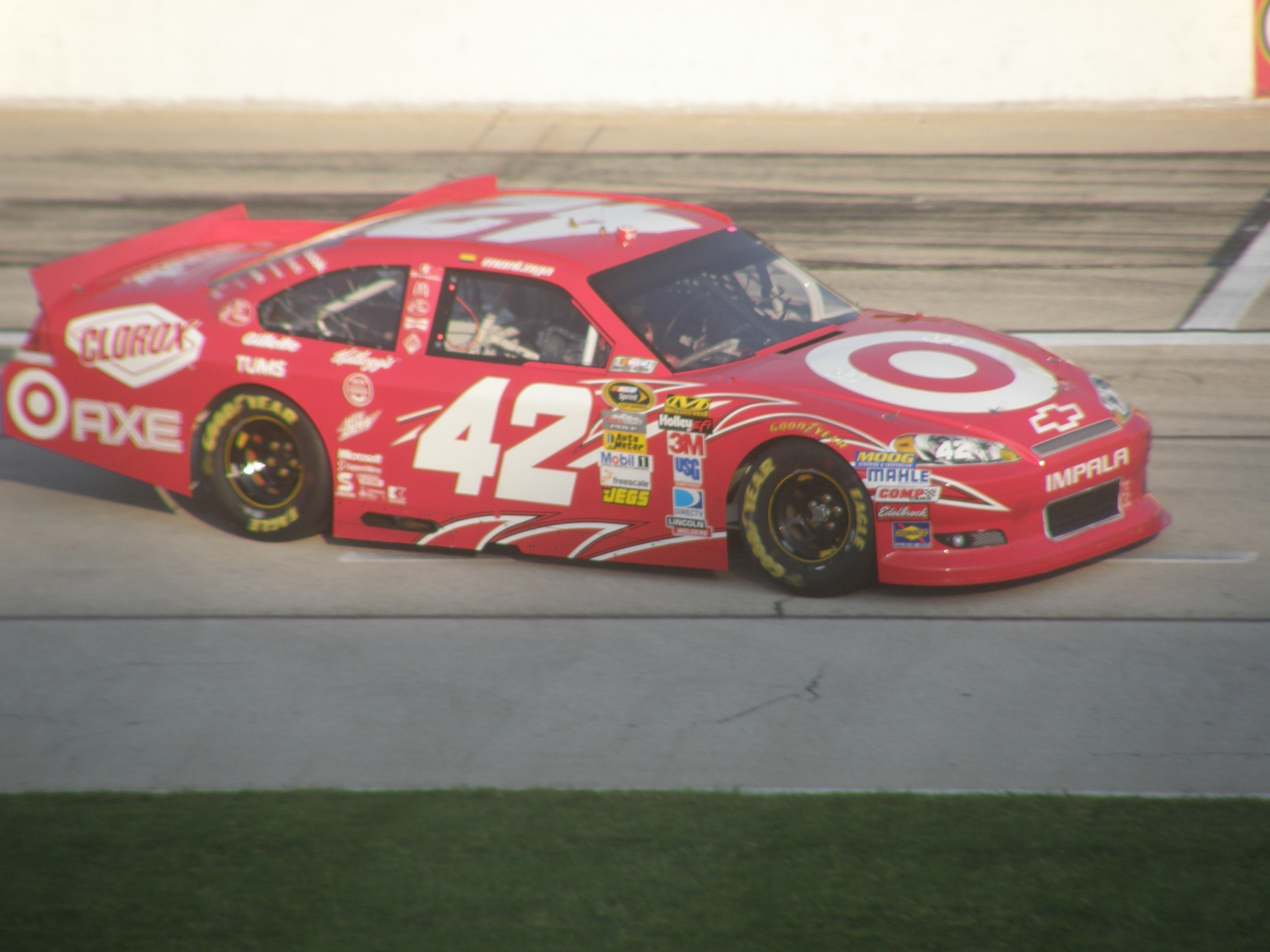 Juan Pablo Montoya conduciendo la Chevrolet No. 42